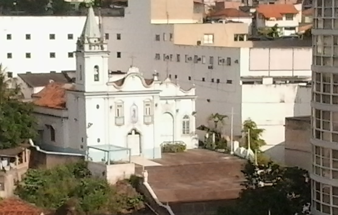 Museu de Arte Sacra de Niterói. Igreja de Nossa Senhora da Conceição da Cidade. Niterói, RJ.